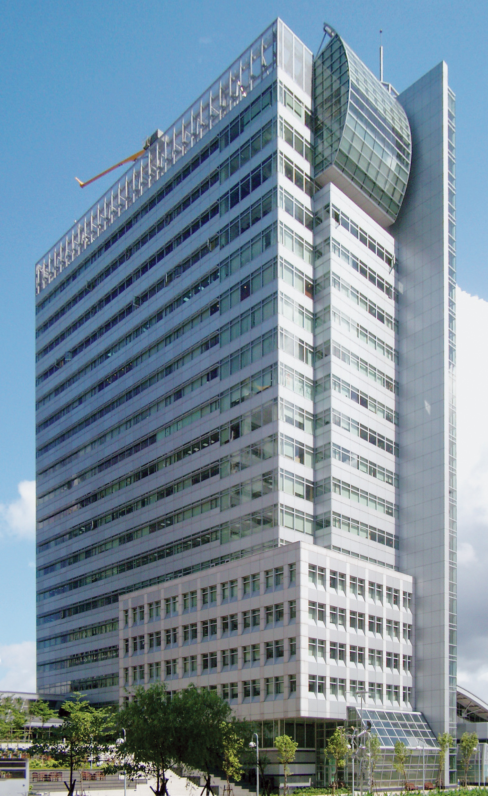 Nankang Software Park Building F.中文（台灣）: 精益科技總部，地址：臺北市南港區園區街3號13樓之1（南港軟體園區F棟）。